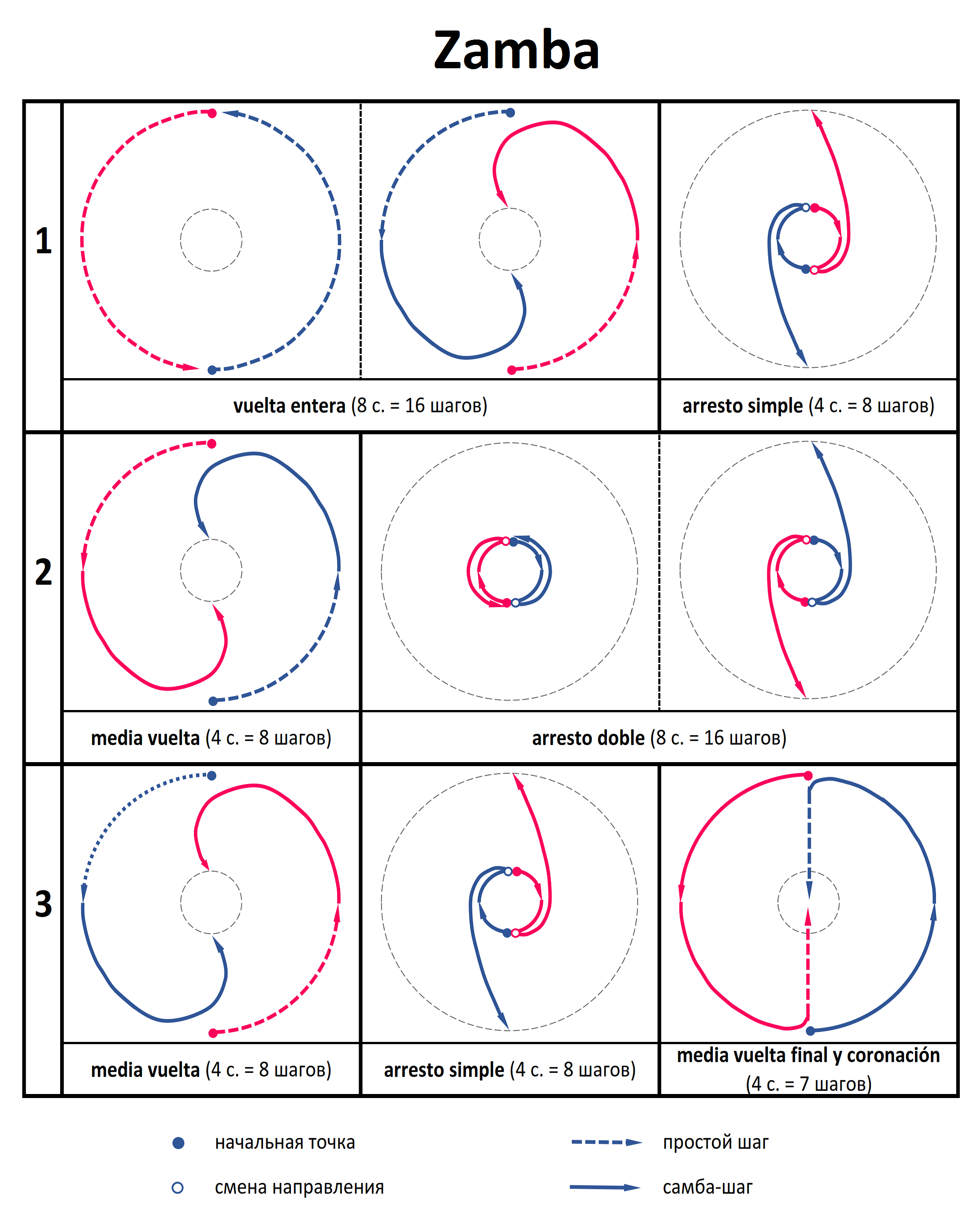 Хореография (схема) аргентинской самбы